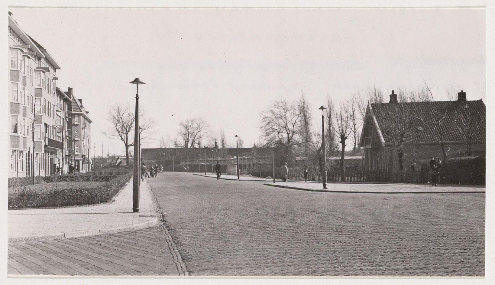 Beschrijving Sloterweg In oostelijke richting gezien van Aalsmeerplein. Op de voorgrond rechts ingang Generaal Vetterstraat Documenttype foto Vervaardiger Eck, J. van (Jacobus, 1873-1946) Collectie Collectie J. van Eck: foto's Datering 20 maart 1938 Geografische naam Generaal Vetterstraat Aalsmeerplein Sloterweg Inventarissen Afbeeldingsbestand A01634001008 Generated with Dememorixer